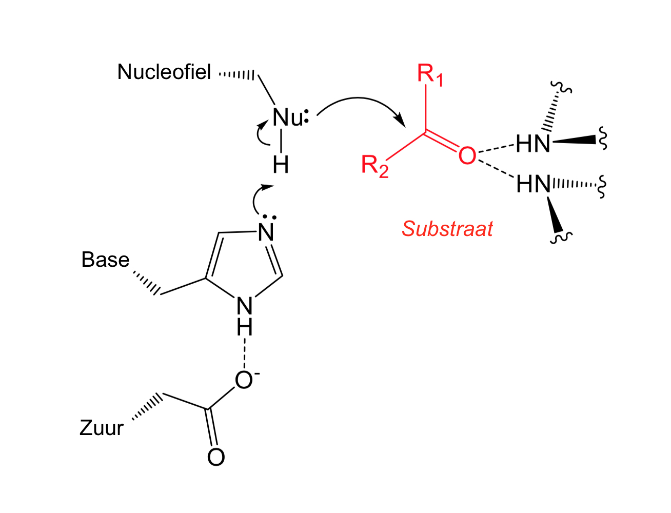 Ladingsnetwerk van protease. Het zuurresidu polariseert de base die op zijn beurt de nucleofiel activeert. Vervolgens kan het substraat worden 'aangevallen'.